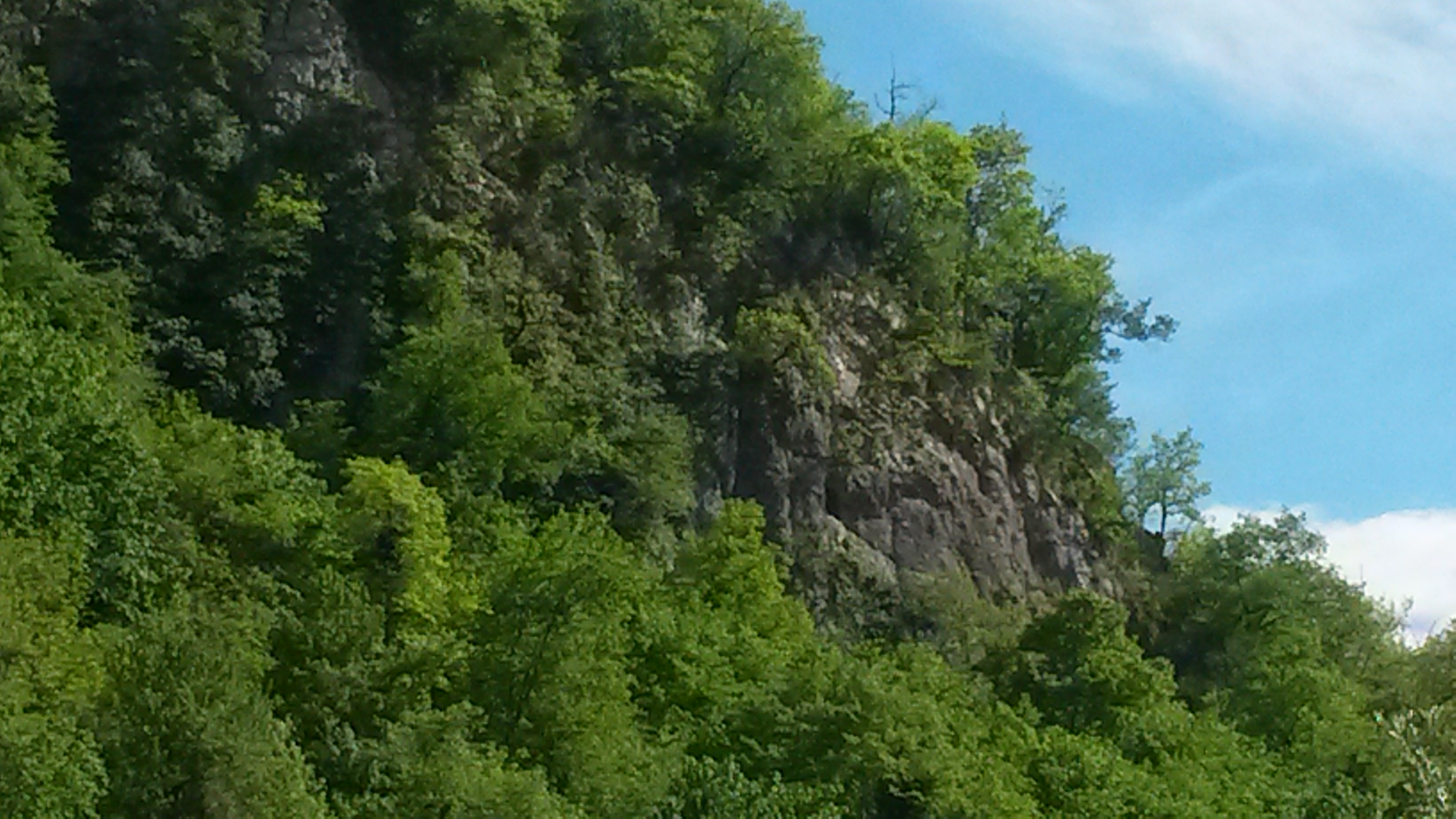 foto della grotta delle cagnasse sopra Laurini